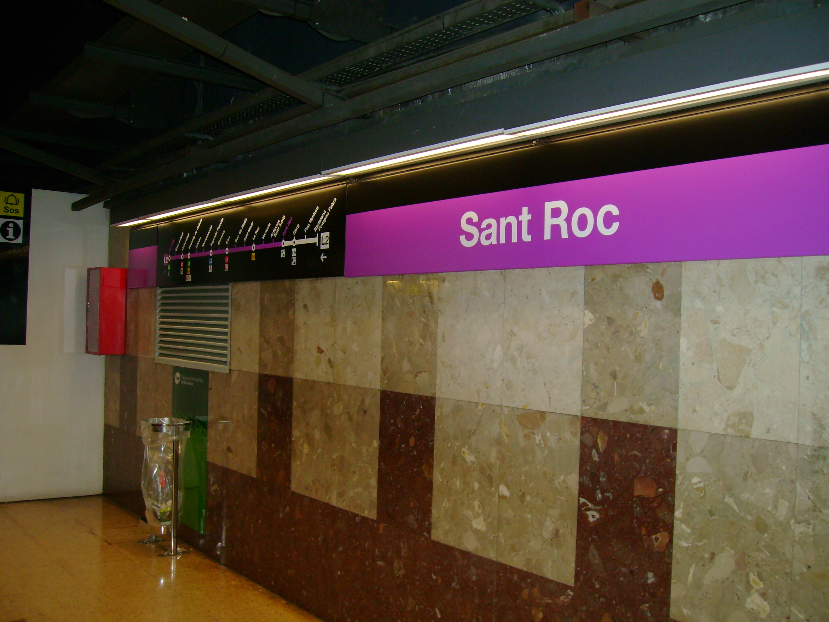 Foto capturada per la càmara de l'Ismael Miralles (el meu amic) a l'estació de Sant Roc (Metro de Barcelona).